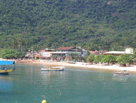 Abraao, Ilha Grande, Rio de Janeiro, Brazil